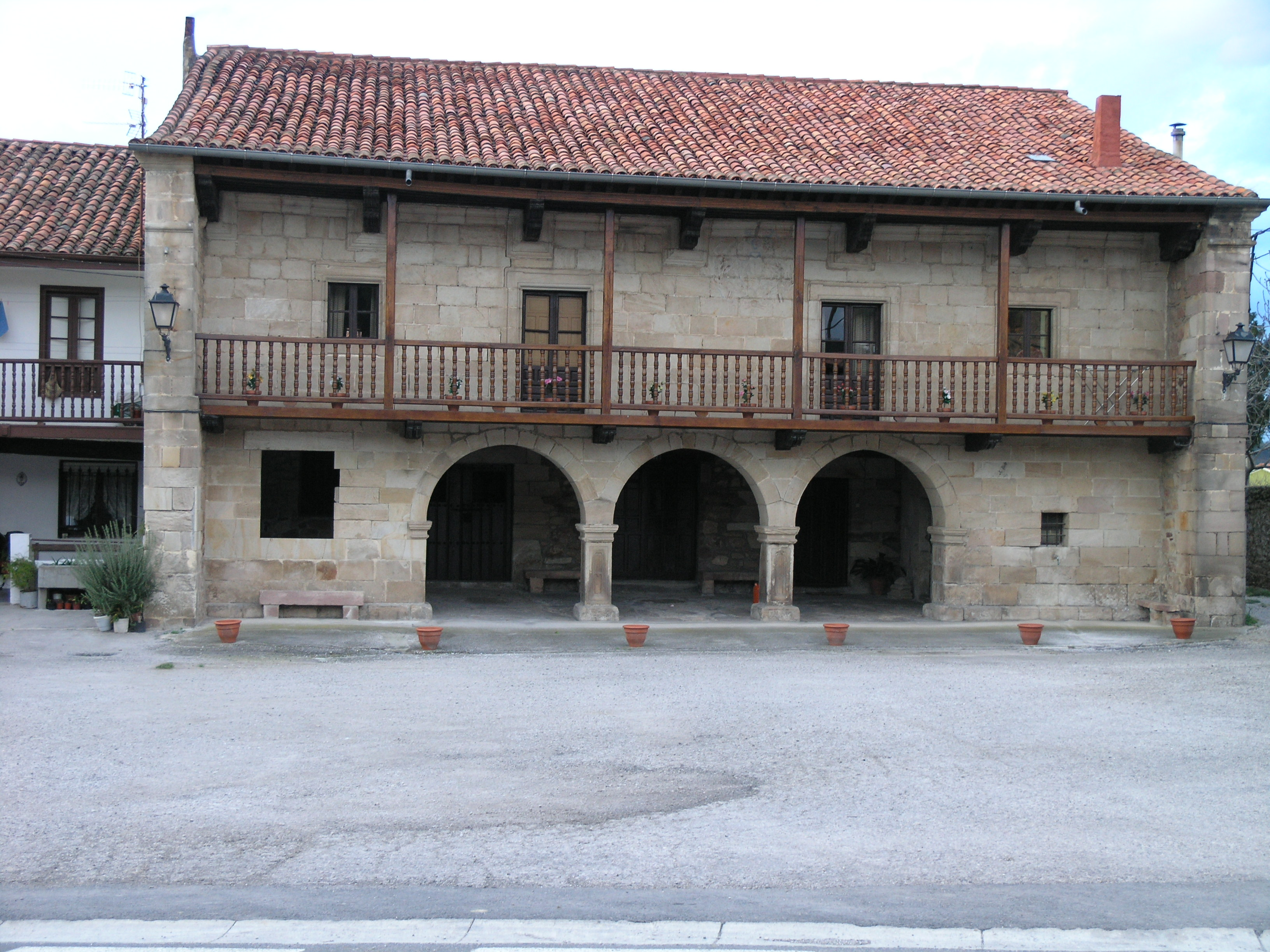 Casa de Quijano, en el Barrio de Rodanil de Viérnoles, en el municipio de Torrelavega, Cantabria, España. Siglo XVIII.